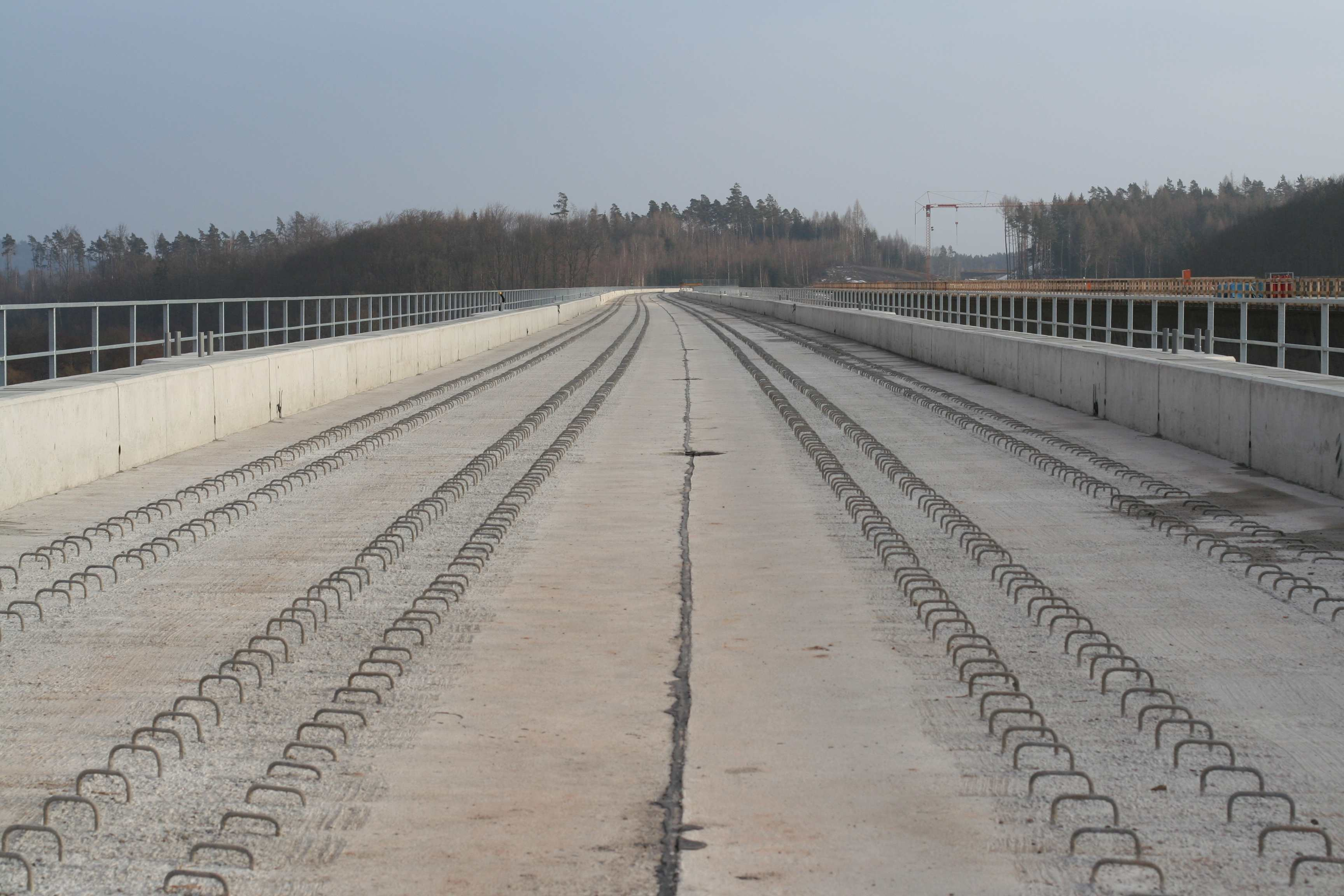 Itztalbrücke Rödental im Landkreis Coburg; Fahrbahnplatte